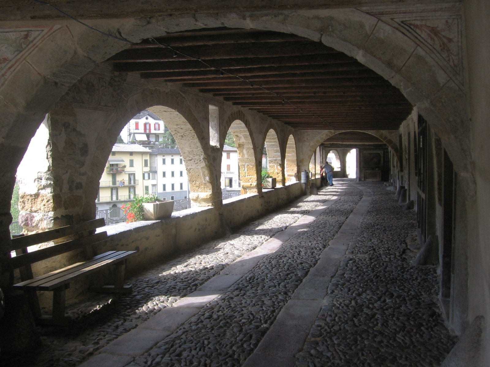 Averara, Bergamo, Italy